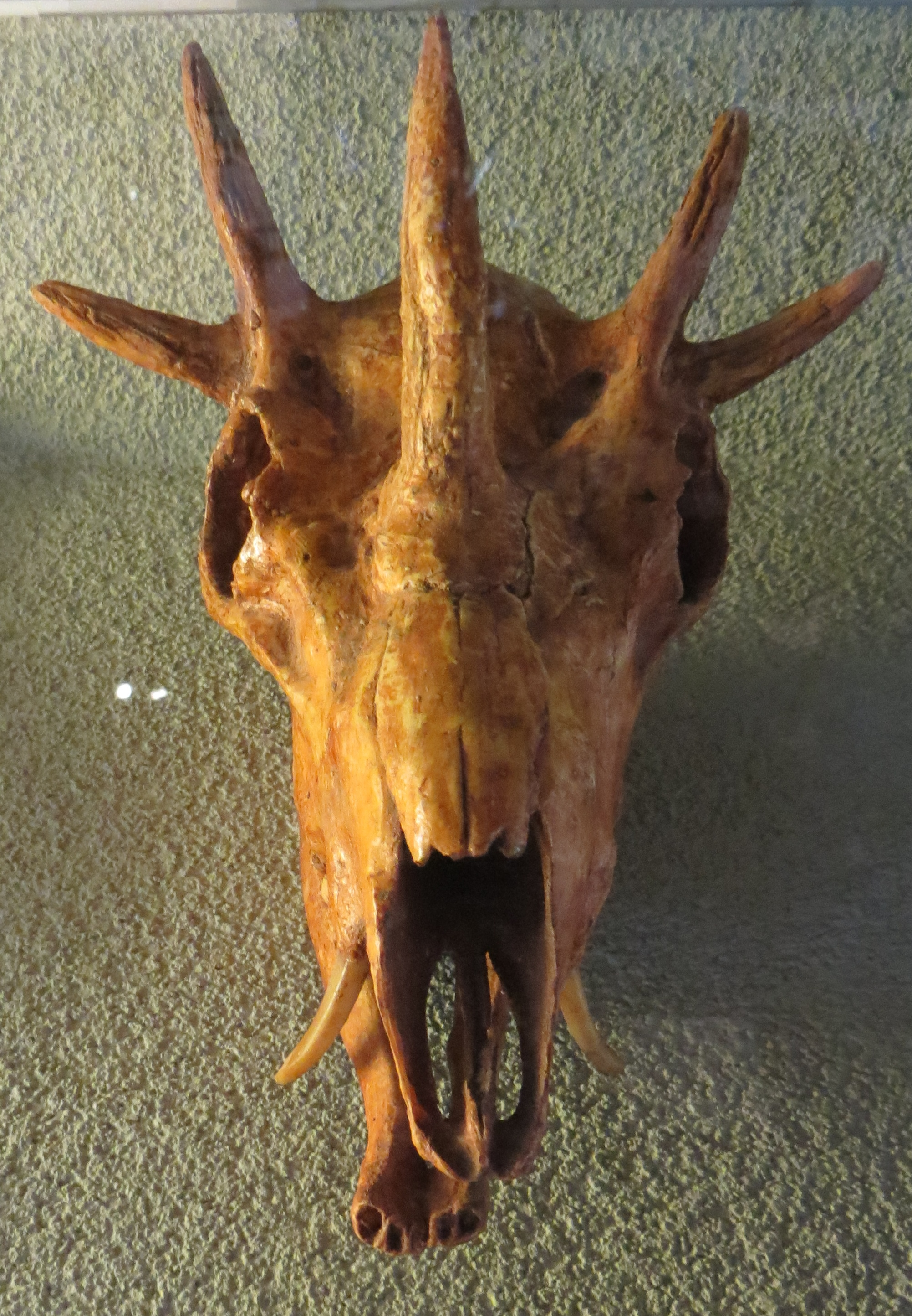 Fossil of Hoplitomeryx, an extinct mammal - Took the picture at Naturalis, Leiden